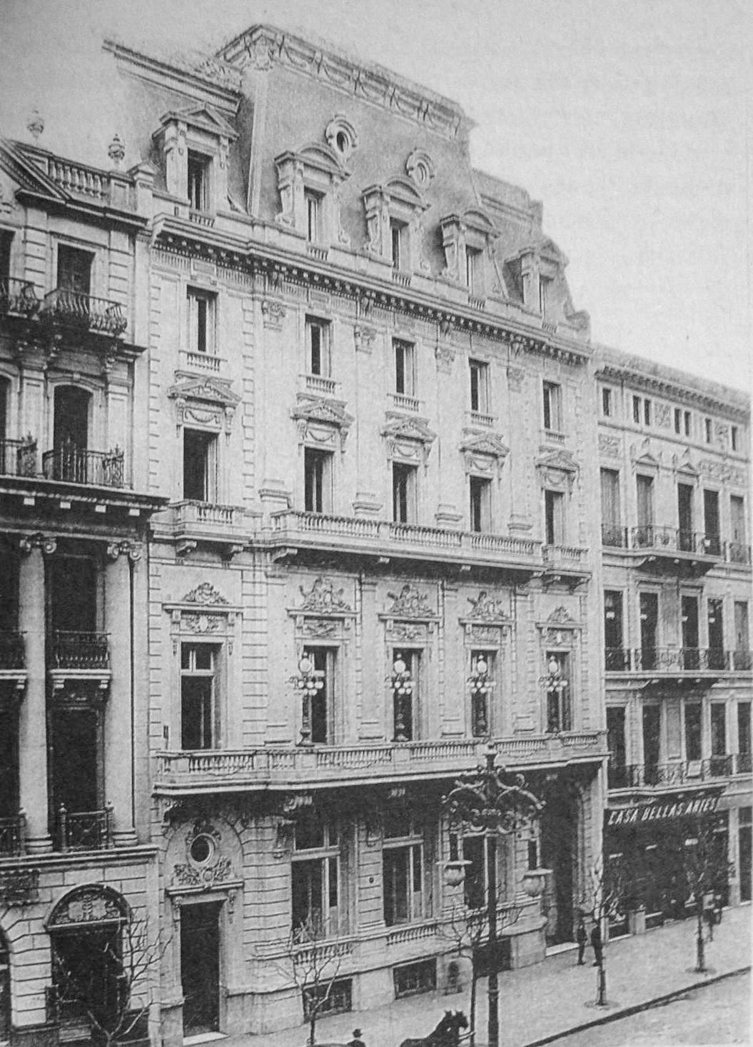 Antiguo edificio del Club del Progreso (Avenida de Mayo nº 633). Actualmente es un edificio de oficinas, y su fachada e interiores fueron totalmente modificados.